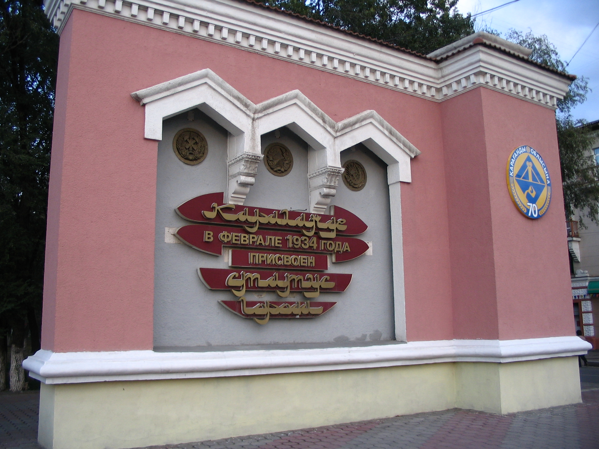 Караганде в феврале 1934 года присвоен статус города на проспекте Бухар Жирау